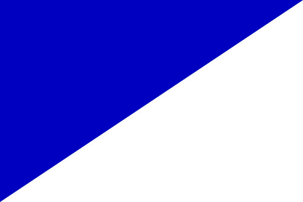 Bandera de la UDA Gramenet